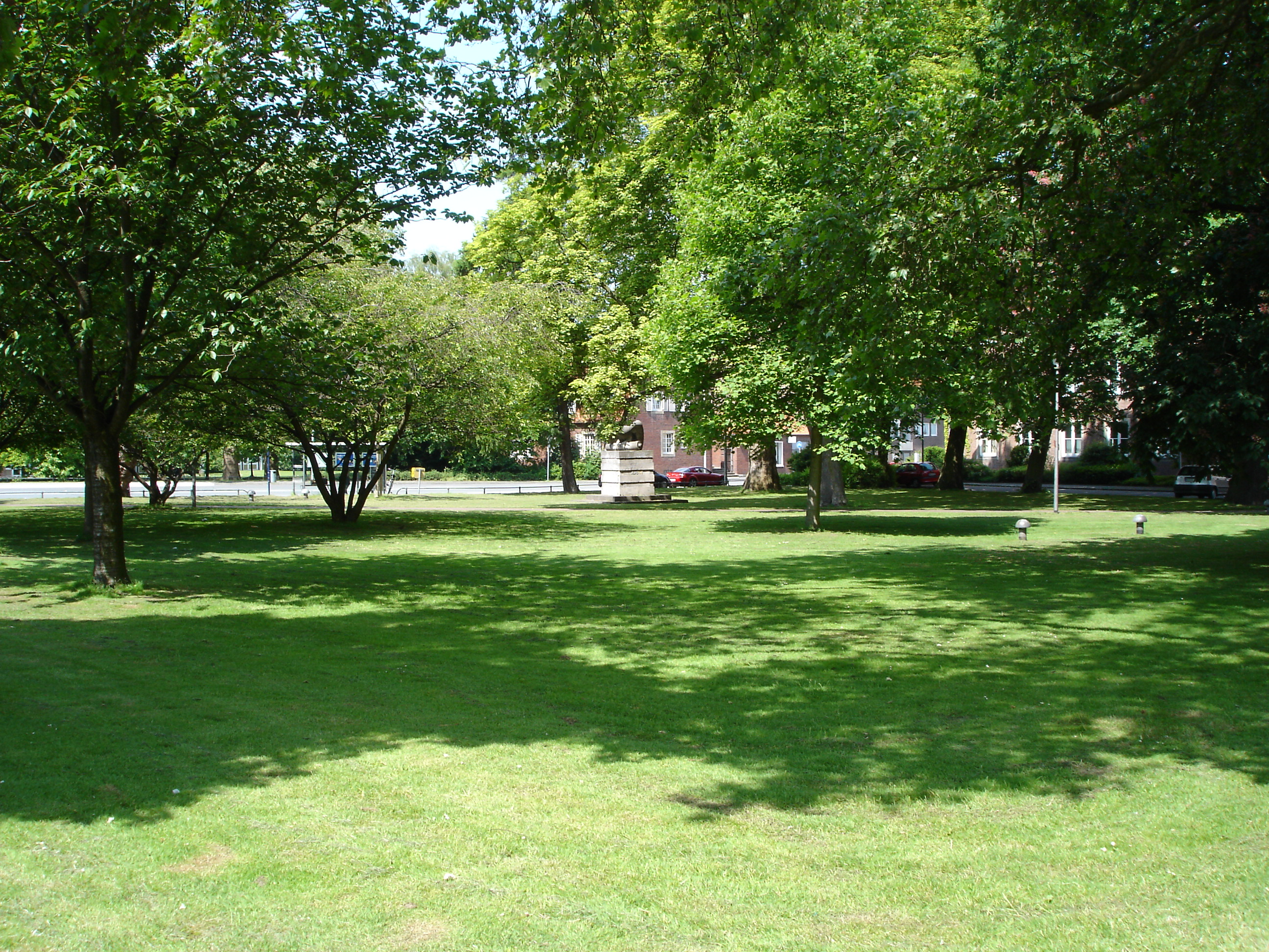 Blick über den Hörsterplatz in Richtung Nordwest in Münster, Westfalen, Deutschland